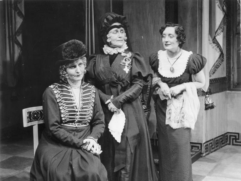 Scherl [Berlin] Emmy Sonnemann als Königing Luise mit (ihrer Oberhofmeisterin) Elsa Wagner und Herma Clement in einer Scene aus "Prinz von Preussen" von Hans Schwarz im Staatl. Schauspielhaus. Regie Löthar Müthel 9597-35